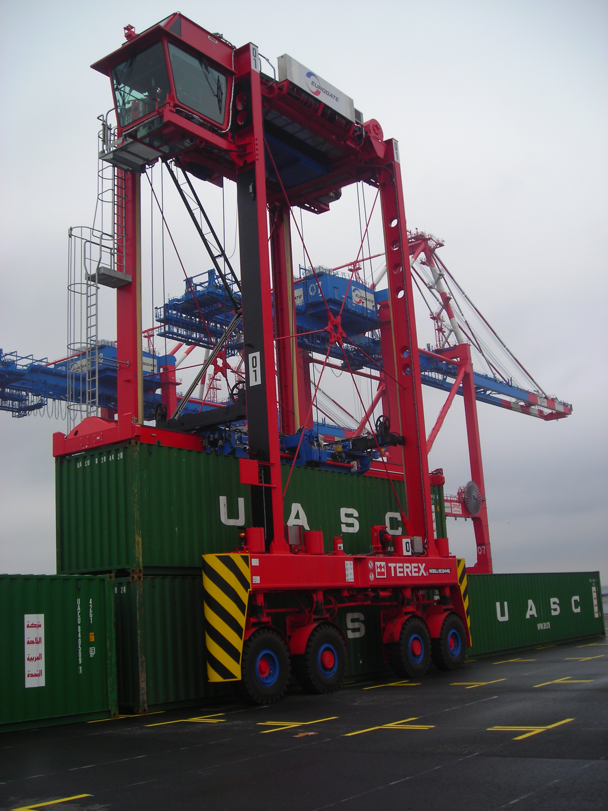 Straddle Carrier mit zwei Containern